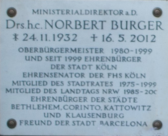 Grabtafe von Norbert Burger